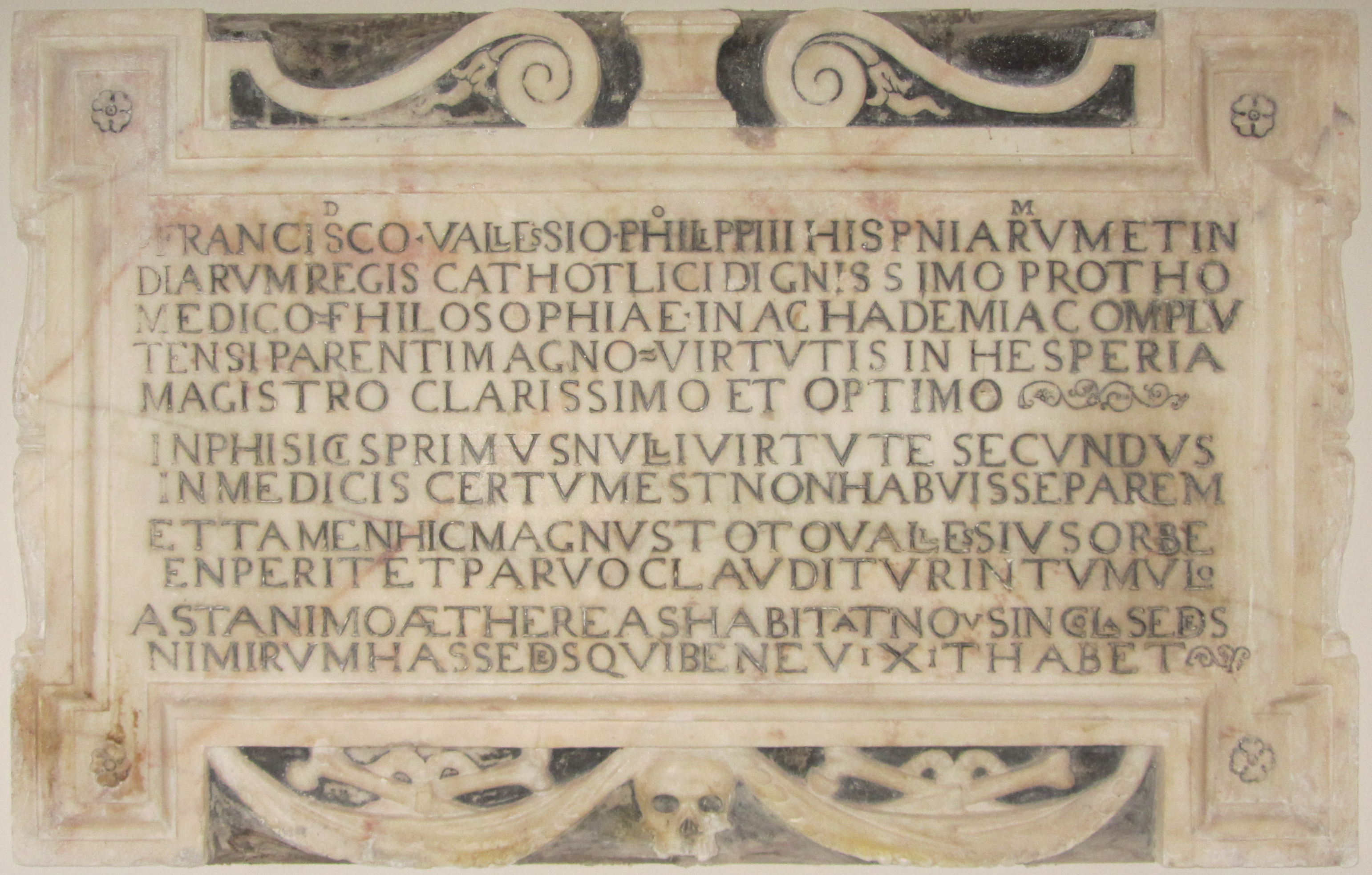 Lápida del nicho mortuorio de Francisco Vallés (1524 – 1592) situada en la Capilla de San Ildefonso de Alcalá de Henares (Comunidad de Madrid - España). Contiene la siguiente inscripción en latín: D. O. M. FRANCISCO VALLESSIO PHILIPPI II HISPNIARVM ET IN DIARUM REGIS CATHOTLICI DIGNISSIMO PROTHO MEDICO = FHILOSOPHIAE IN ACHADEMIA COMPLV TENSI PARENTI MAGNO = VIRTVTIS IN HESPERIA MAGISTRO CLARISSIMO ET OPTIMO. IN PHISICIS PRIMVS NVLLI VIRTVTE SECVNDVS IN MEDICIS CERTVM EST NON HABVISSE PAREM ET TAMEN HIC MAGNVS TOTO VALLESSIVS ORBE EN PERIT ET PARVO CLAVDITVR IN TVMVLO AST ANIMO AETHEREAS HABITAT NOVS INCOLA SEDES NIMIRVM HAS SEDES QVI BENE VIXIT HABET. Traducción al español: “AL DIOS MAS BUENO Y GRANDE. A Francisco Valles dignísimo Protomédico de Felipe II, Rey Católico de las Españas y de las Indias, filósofo de la Academia Complutense. Gran Padre y Maestro de virtudes en España, varón esclarecido y bondadosísimo. El primero en Ciencias Físicas, no aventajado por nadie en virtud, médico acertadísimo y sin igual, y sin embargo este gran Valles, tan grande en el mundo, encerrado está en este pequeño túmulo. Mas su alma subió a habitar las mansiones eternas y allí está gozando porque vivió bien”.